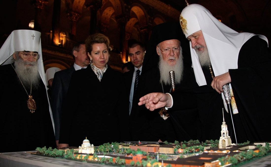 Patriarch Kirill shows to patriarch Bartholomew and metropolitan Vladimir of Petersburg a model of Kronstadt area during their visit to Kronstadt Orthodox church.